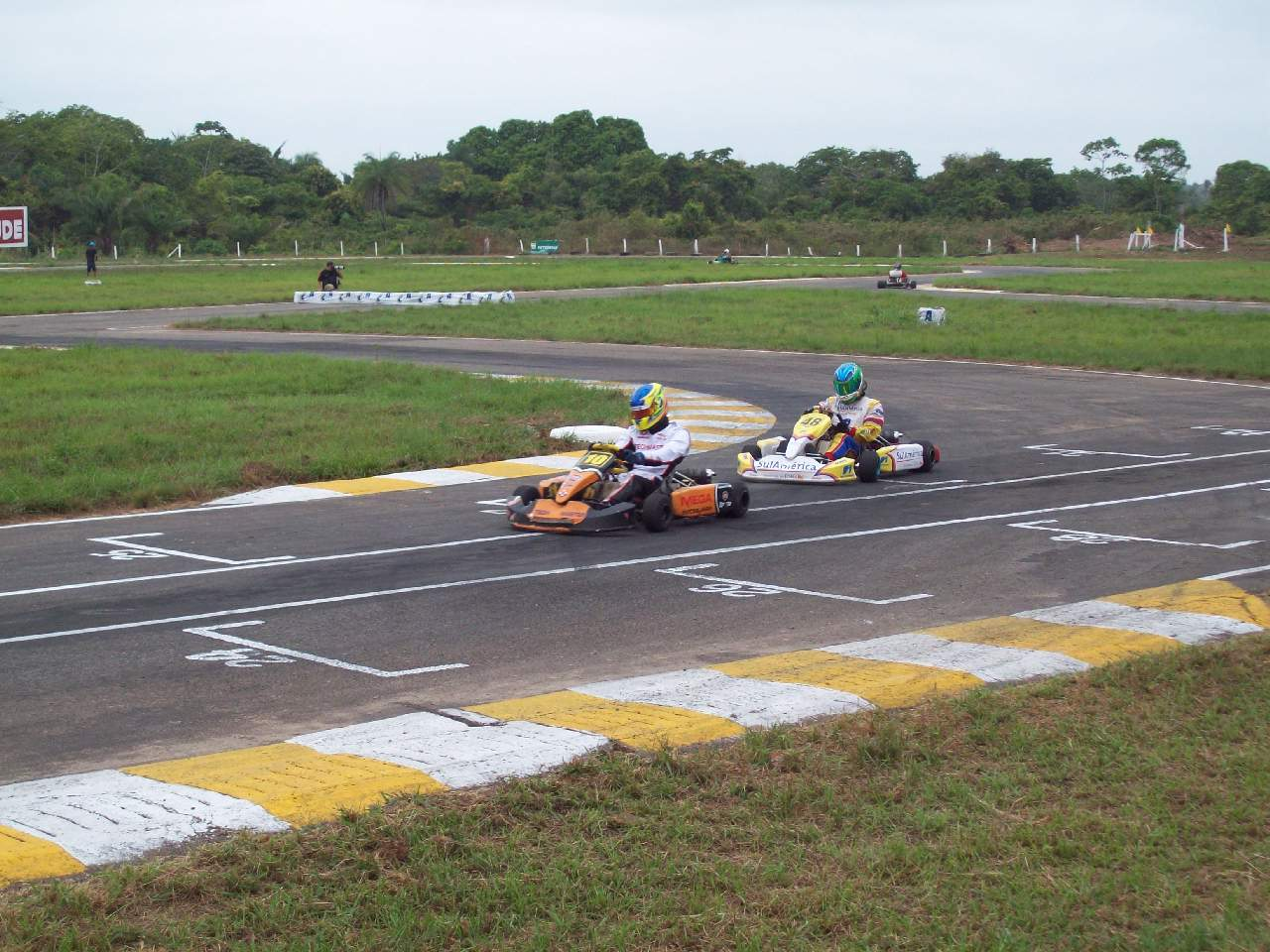 Competição no kartódromo de Imperatriz Maranhão, Brasil.